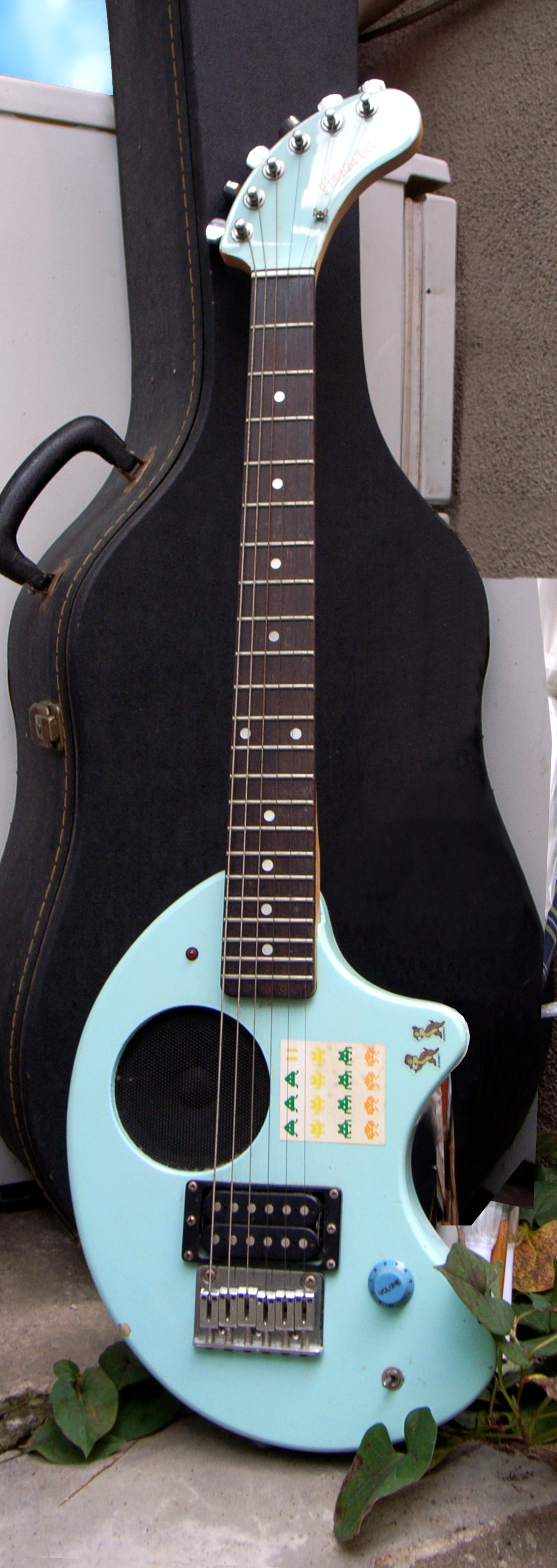 Fernandes ZO-3 series